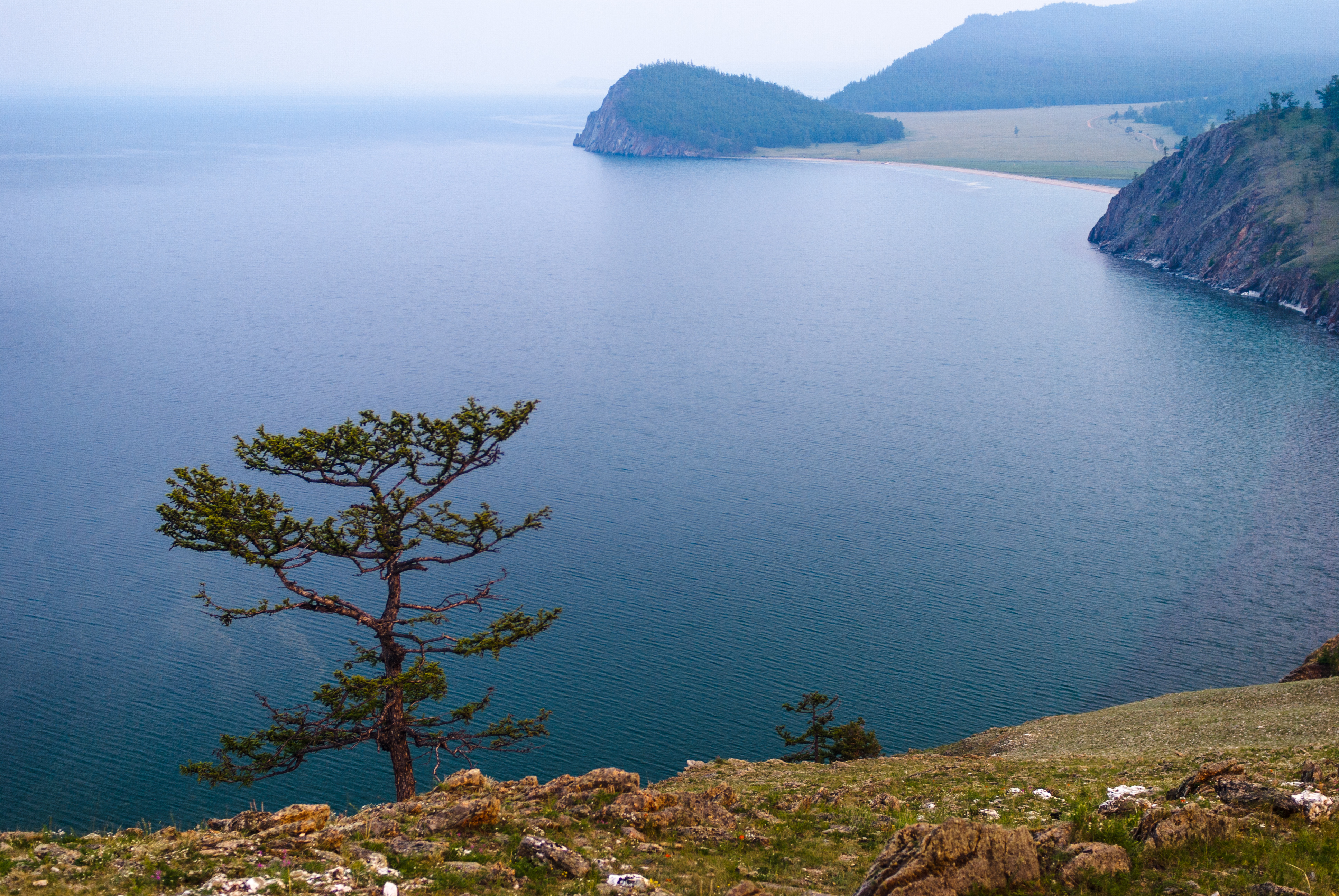 Прибайкальский национальный парк. Территория парка в виде узкой полосы охватывает большую часть (около 470 км) западного побережья озера Байкал — от посёлка Култук на юге до Кочериковского мыса на севере. Можно сказать, что это самый "протяженный" из национальных парков России. Он занимает восточные склоны Приморского хребта, южную часть Олхинского плато, бассейн р. Большая Речка (впадает в р. Ангару), а также о. Ольхон. Южная часть парка рассечена вытекающей из Байкала могучей Ангарой. Иркутский район, Иркутская область. This image is related to the protected area of Russia number 3800118